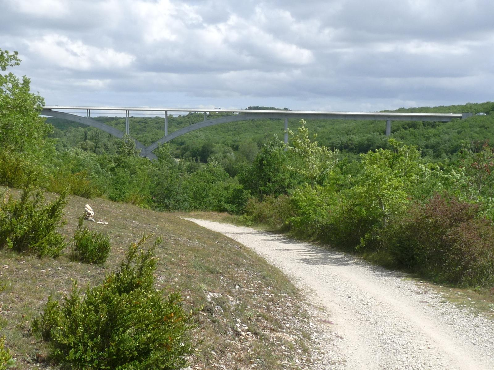 Viaduc de l'Anguienne vu du nord-ouest, Soyaux, Charente, France